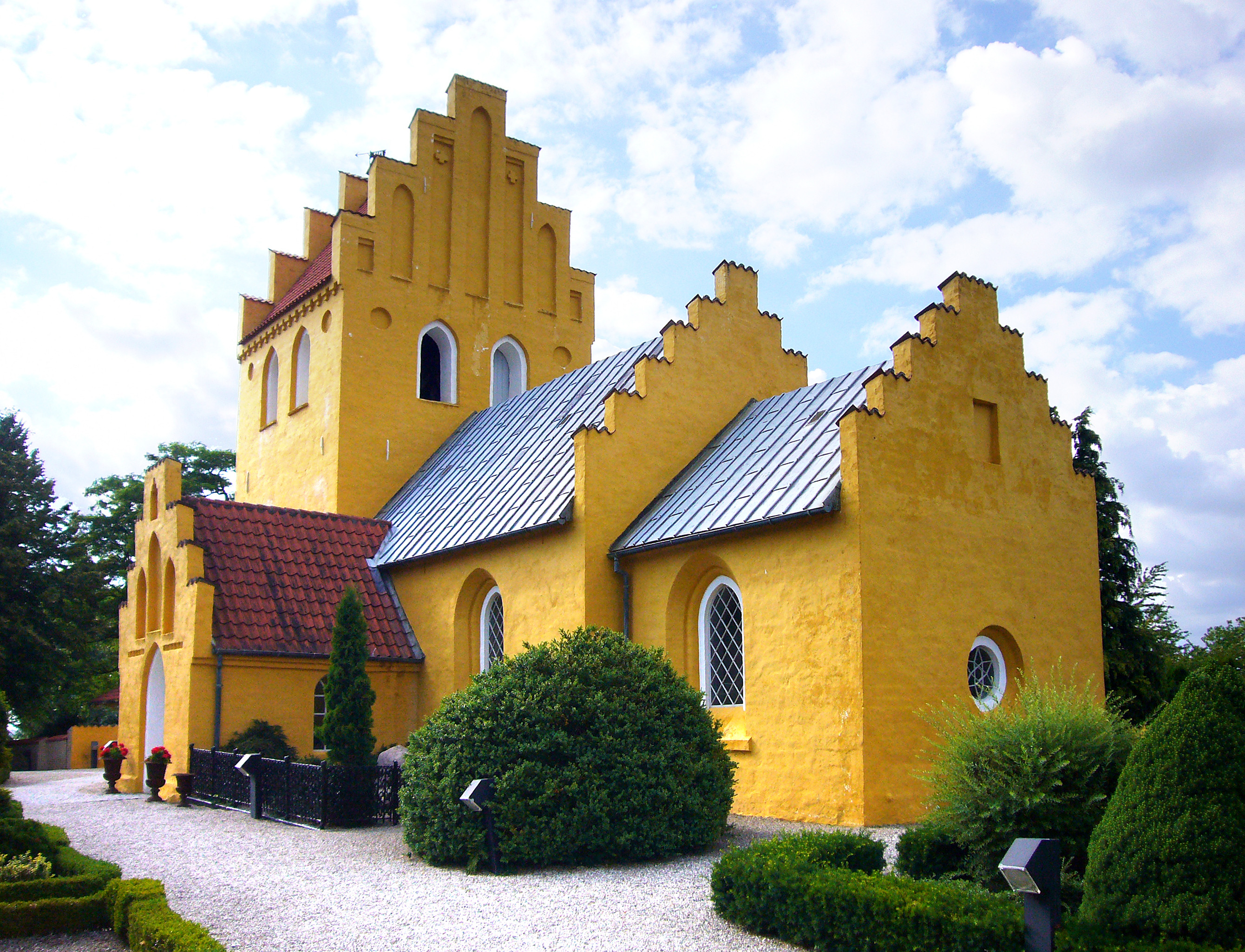 Havdrup Kirke, Gammel Havdrup, Denmark.